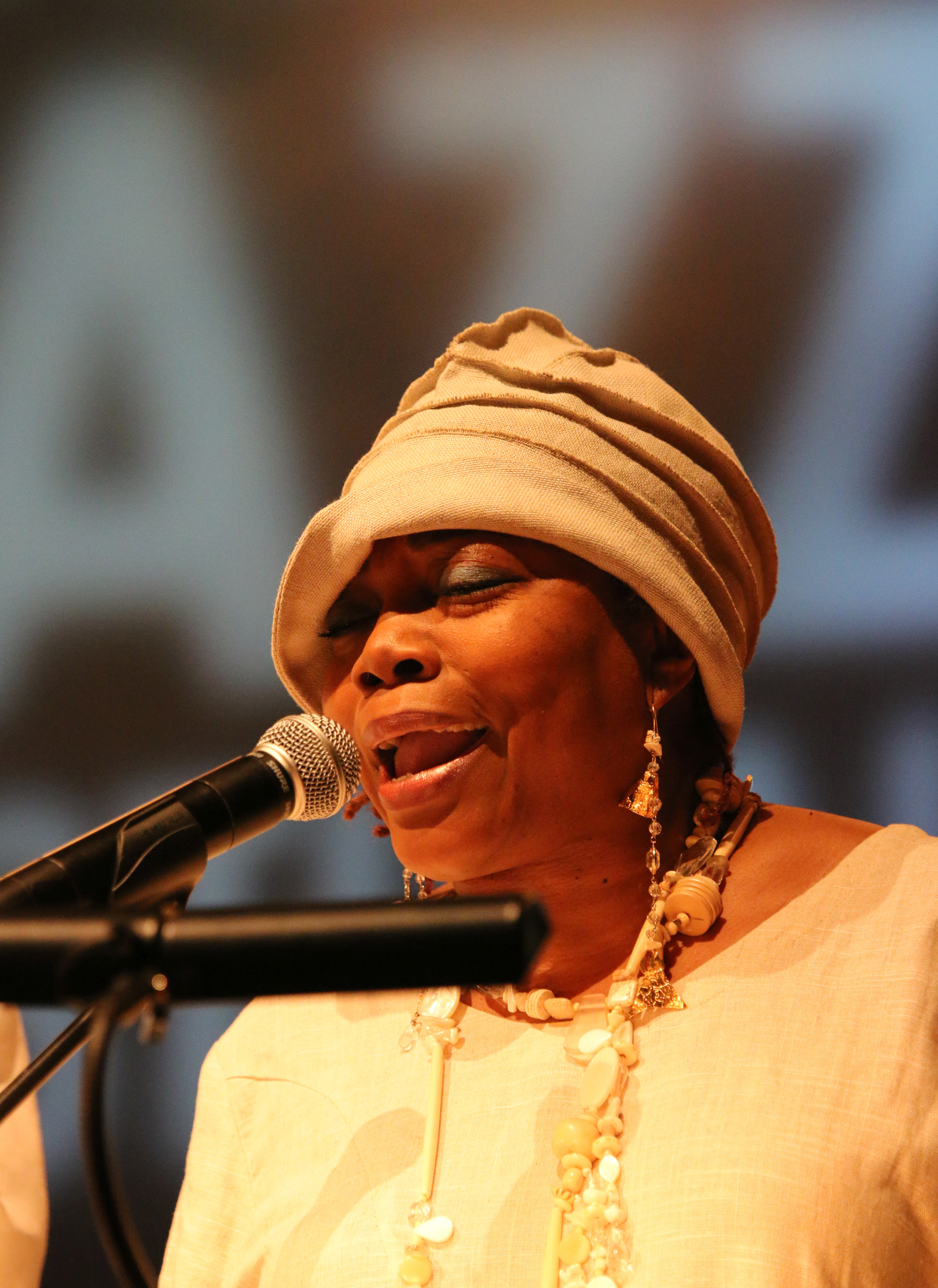 46. Deutsches Jazzfestival Frankfurt 2015: AACM Vocal Ensemble: Dee Alexander